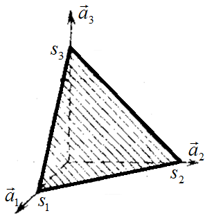 Miller indekslərini təyin etmək istədiyimiz atom müstəvisi